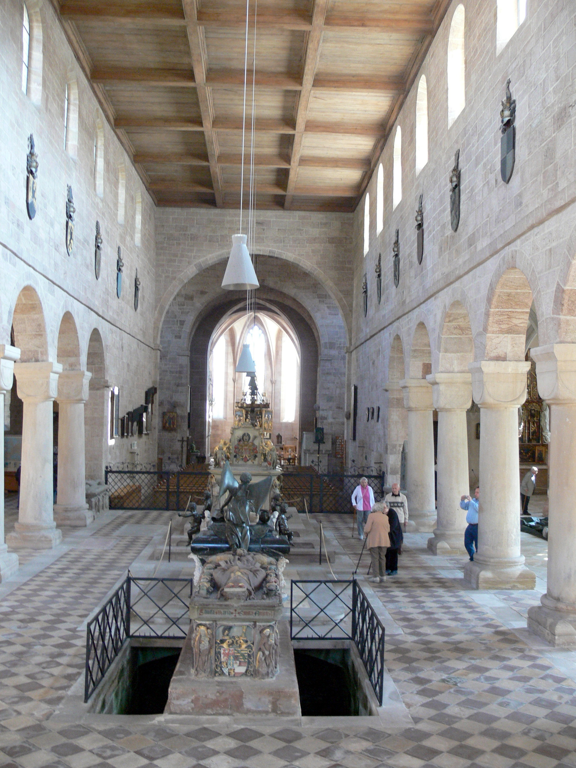 Münster in Heilsbronn. Hohenzollerngrabstätten im Langhaus